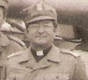 Bp gen. bryg. Sławoj Głódź na poligonie w Drawsku.